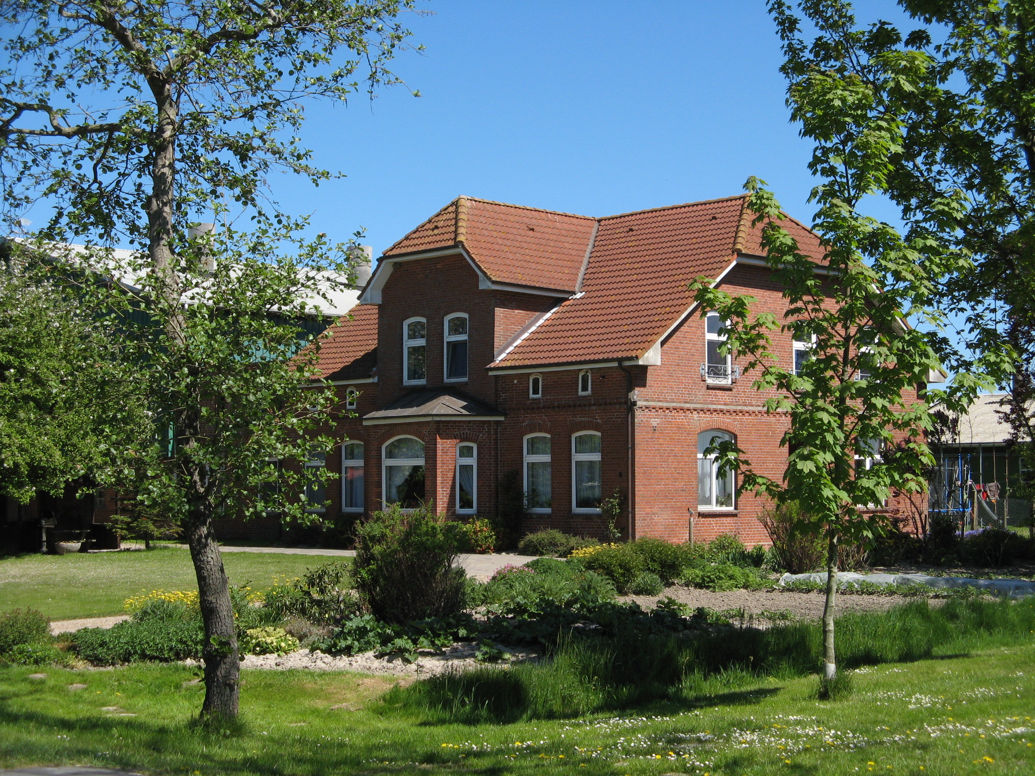 House in Flederwurth, Groven Author: Dirk Ingo Franke